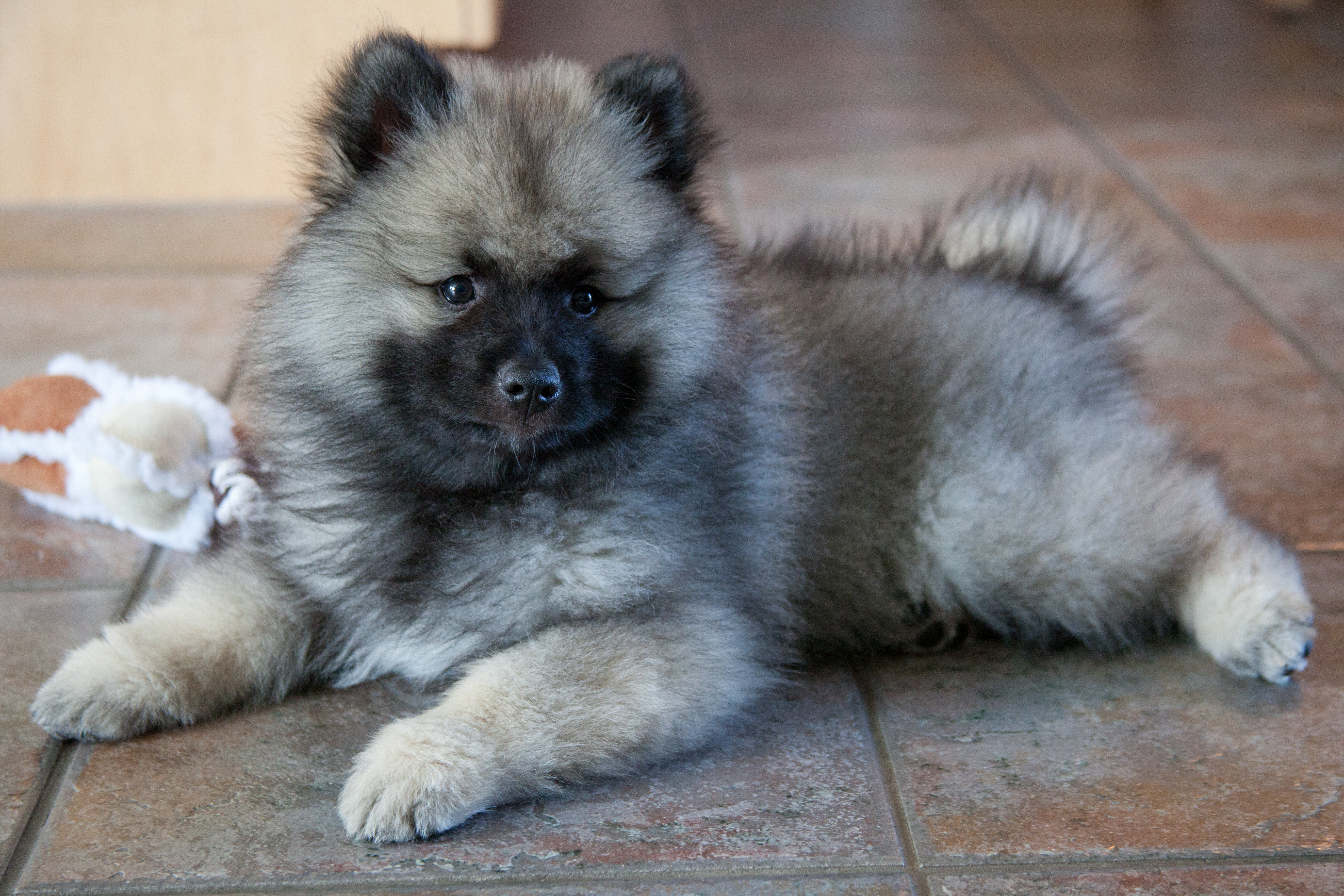 Keeshond